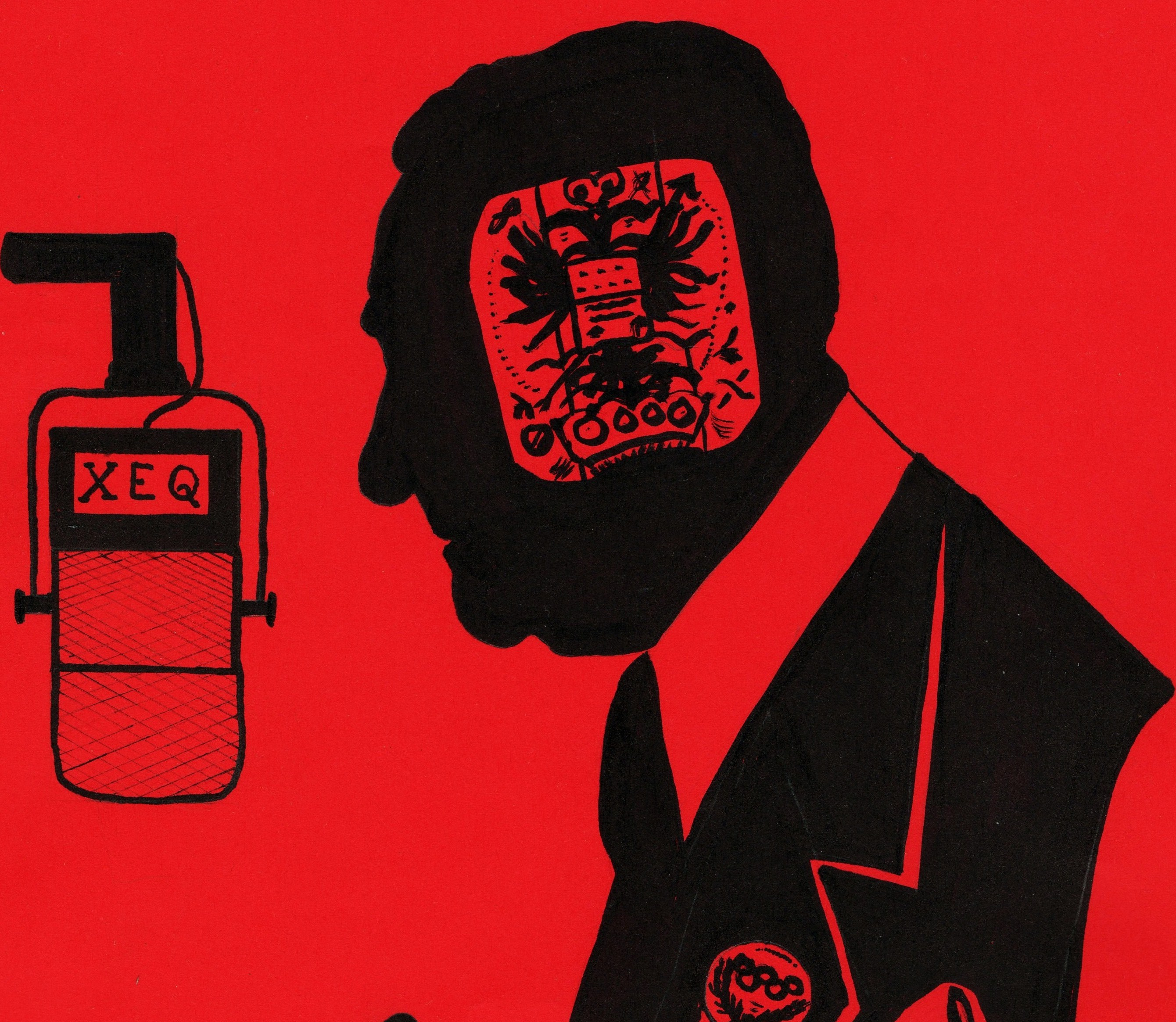 Detalle de silueta dieciochesca del locutor Septién por Carlos Fuentes y Espinosa